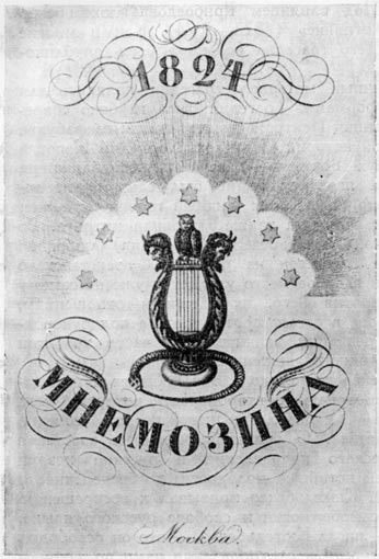 Гравированный титульный лист литературного альманаха «Мнемозина». 1824 год. Издан В. К. Кюхельбекером и В. Ф. Одоевским